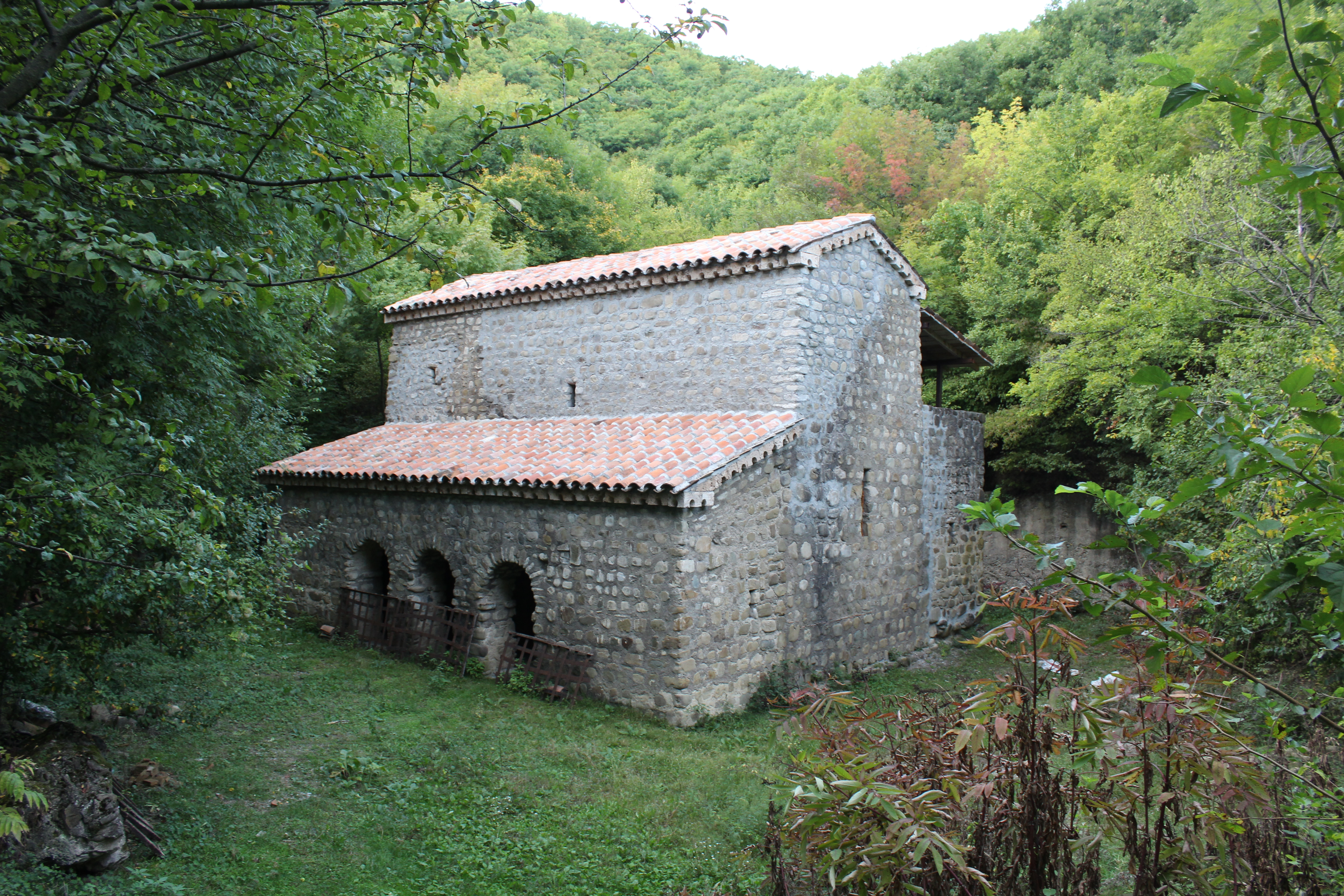 კარდანახის წმინდა ნიკოლოზის ეკლესია